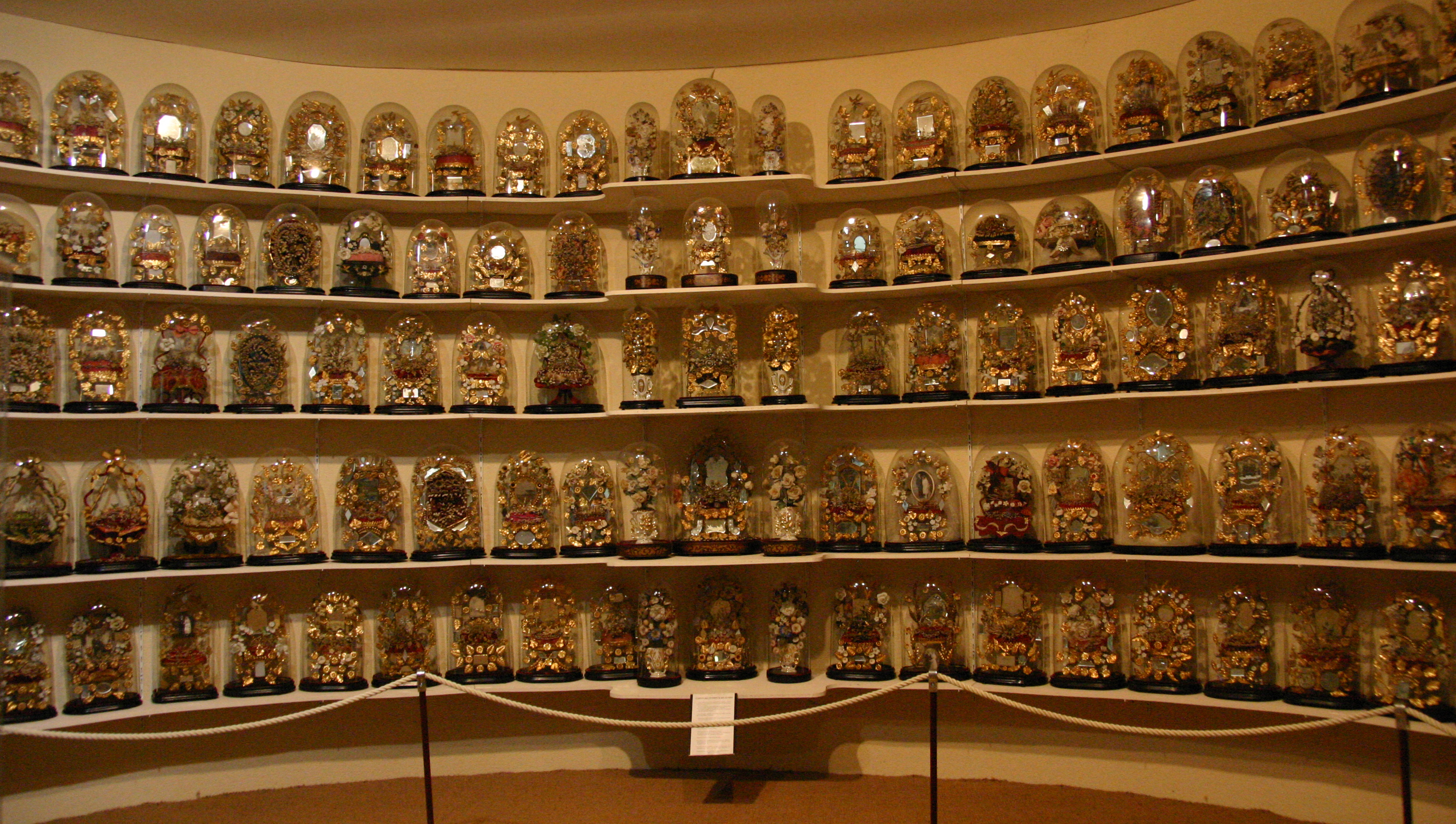 Château de Villesavin, Hochzeitsmuseum